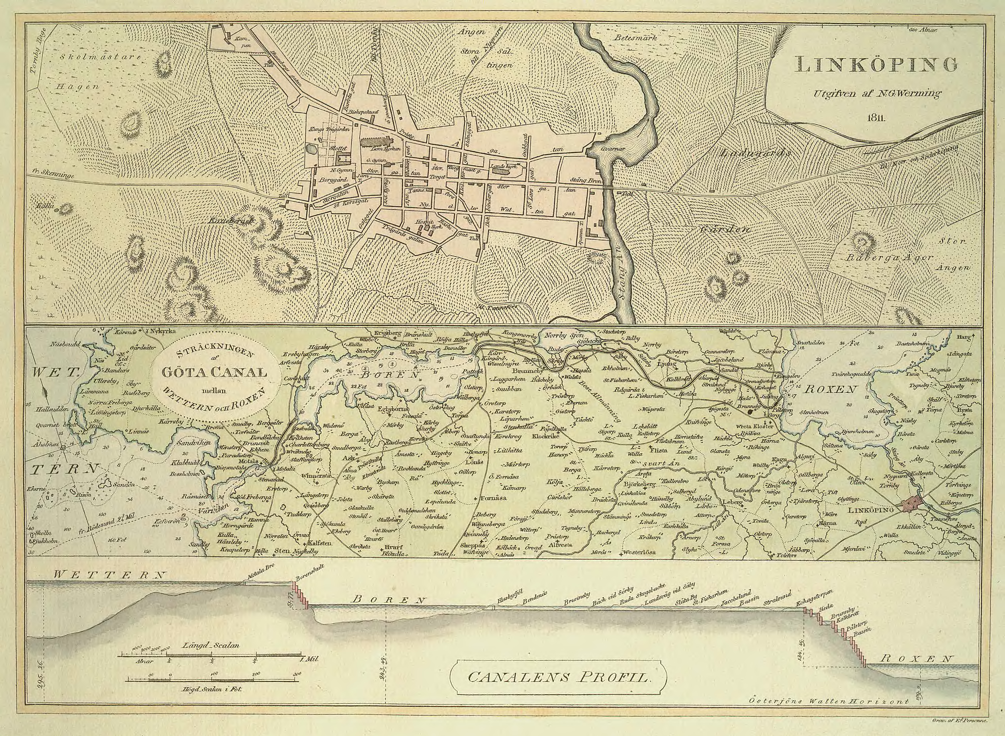 Karta över Linköping och Göta Kanal från 1811 av NG Werming.